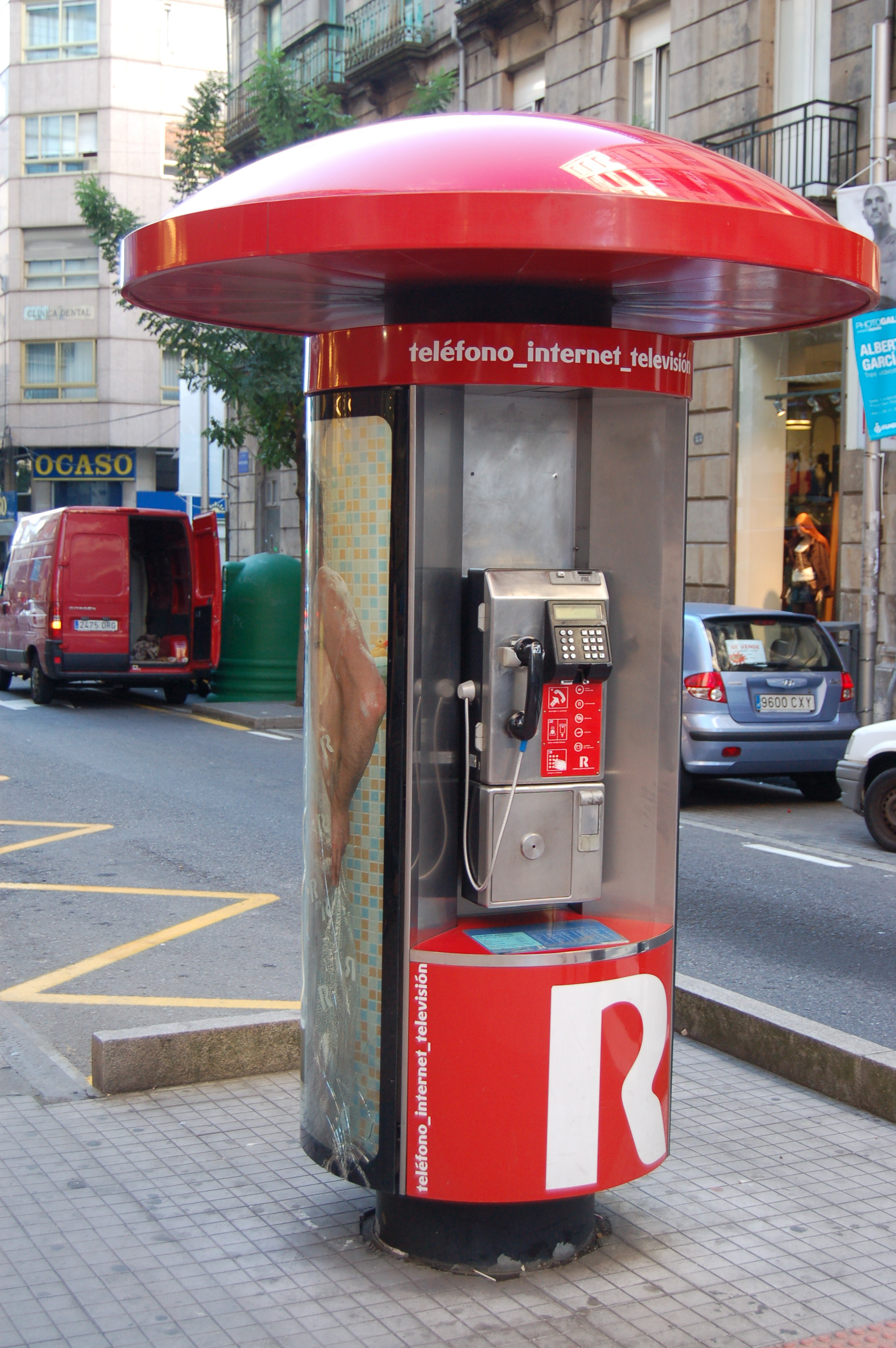 Cabina da empresa de Telecomunicacións R na rúa Benito Corbal de Pontevedra